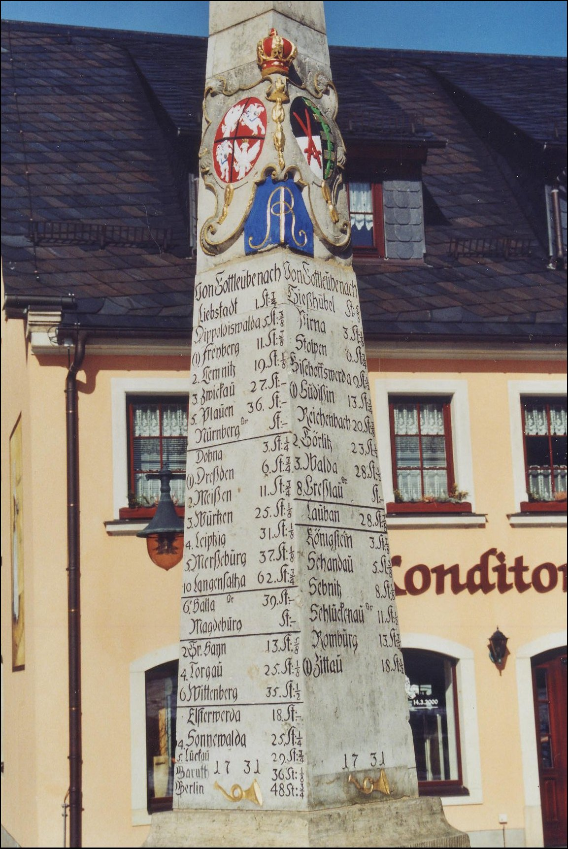 Bad Gottleuba: Postmeilensäule (1731) auf dem Markt.